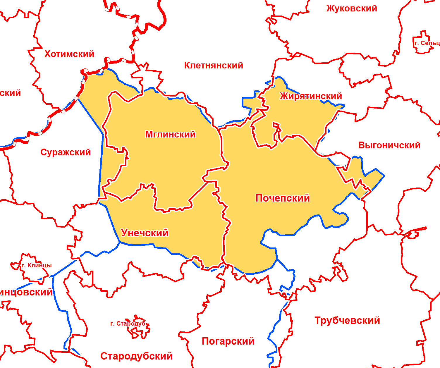 Мглинский уезд Черниговской губернии в современной сетке районов